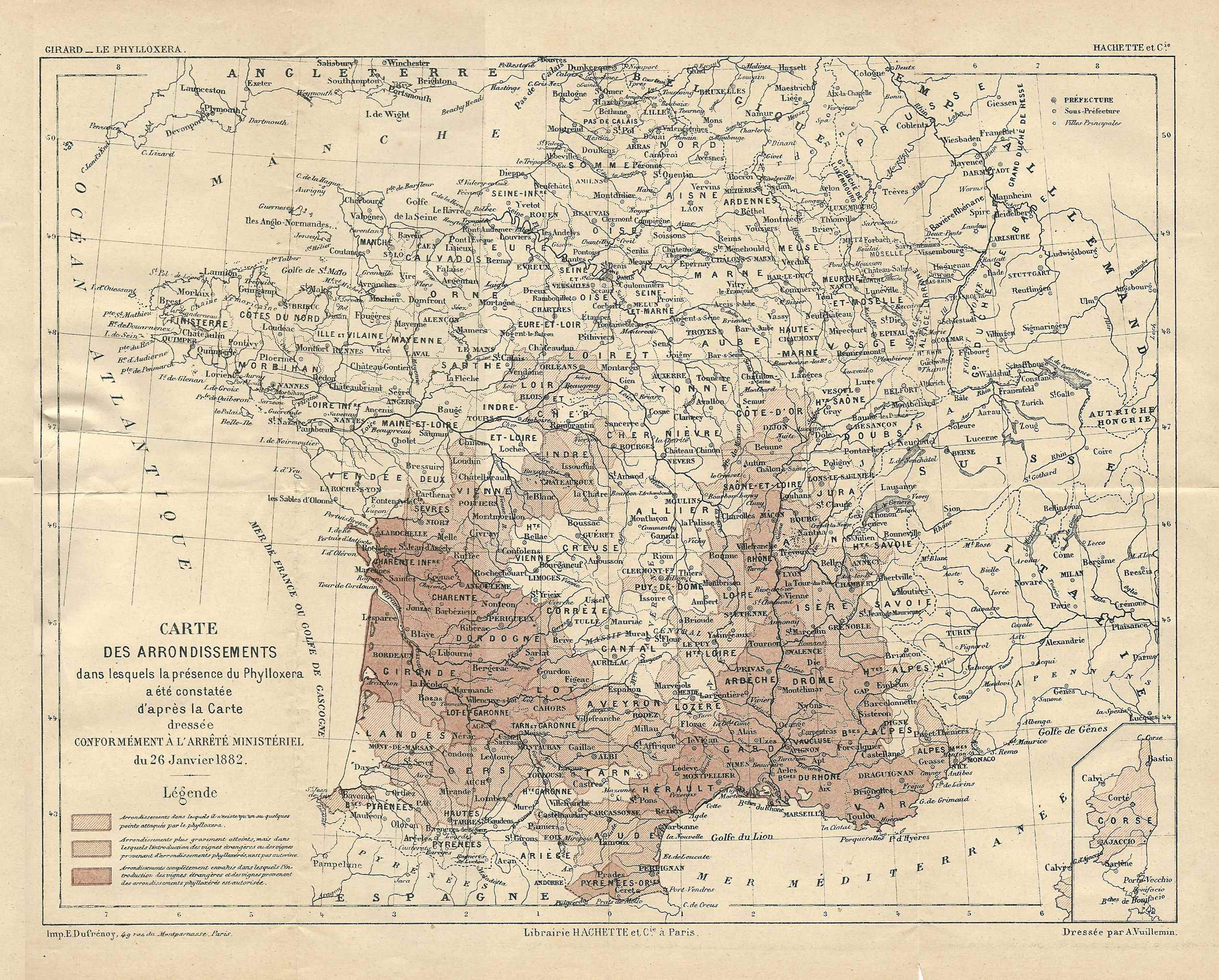 Carte au 26 janvier1882 de l'avancée du Phylloxéra en France